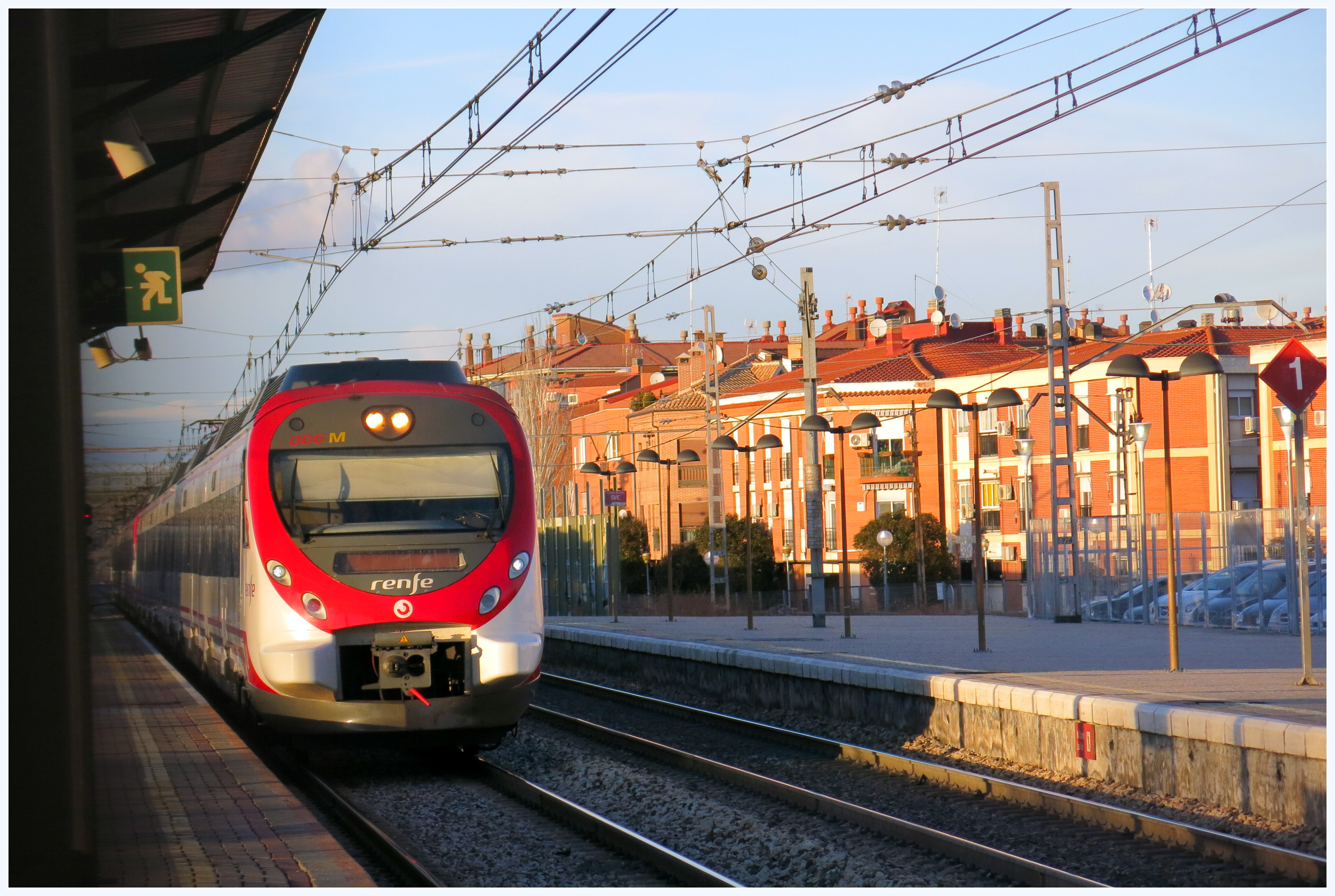 el tren llega